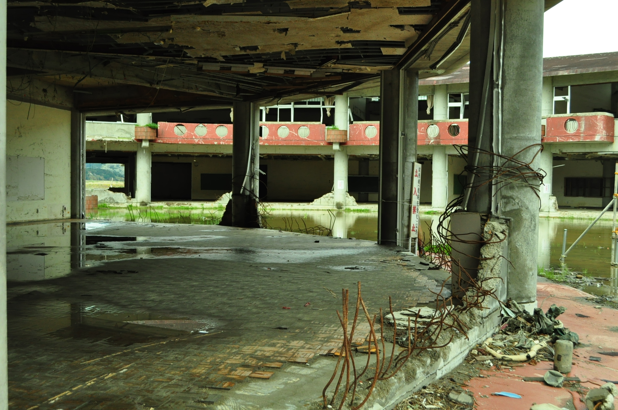 津波は、鉄筋コンクリートの壁を突き破り、すべてを飲み込んだ。